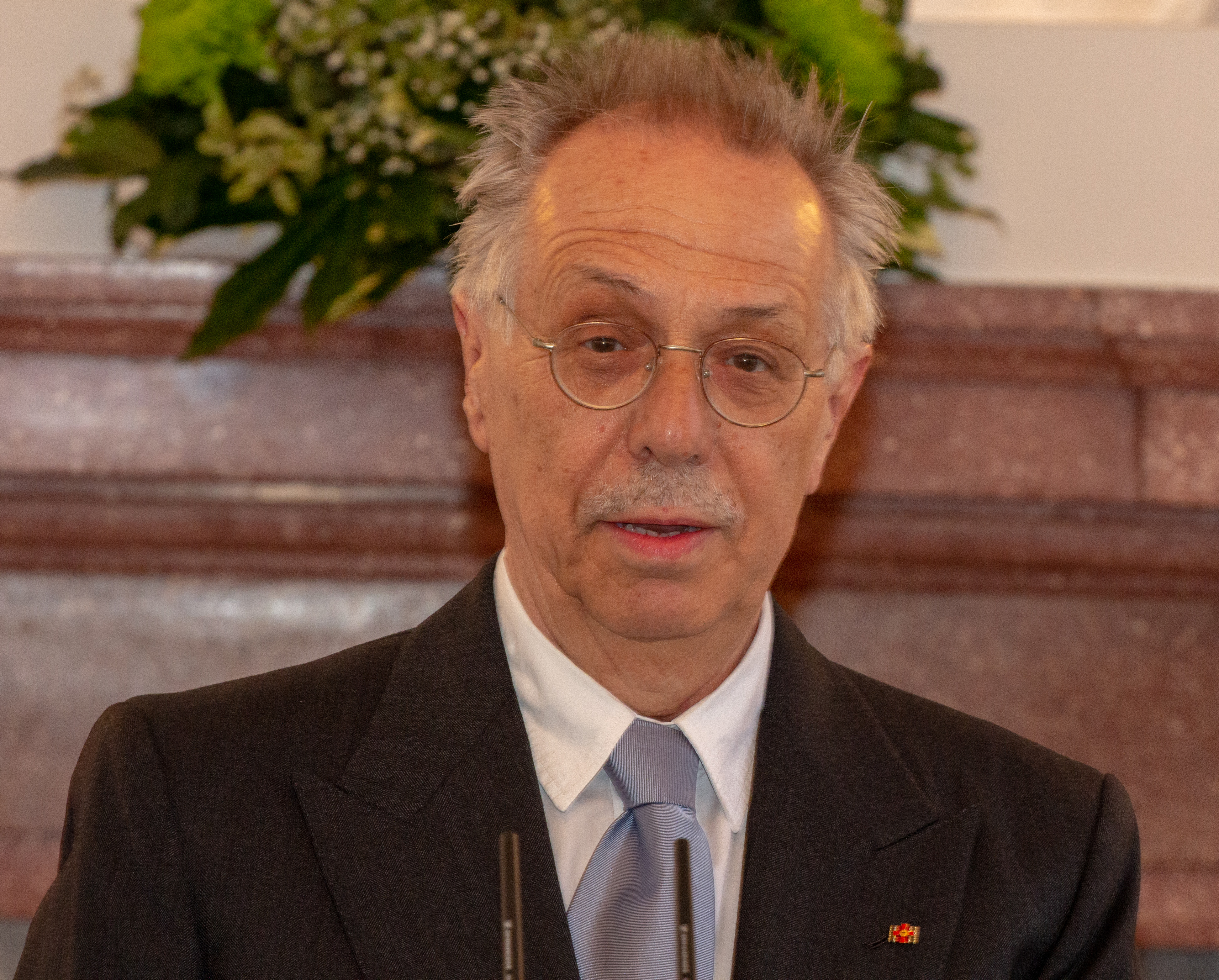 Dieter Kosslick bei der Verleihung des Bundesverdienstkreuz am 10. April 2019 in Berlin.